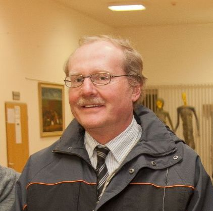 Profesor doktor Miroslav Novák v budově Fakulty sociálních věd univerzity Karlovy v Jinonicích